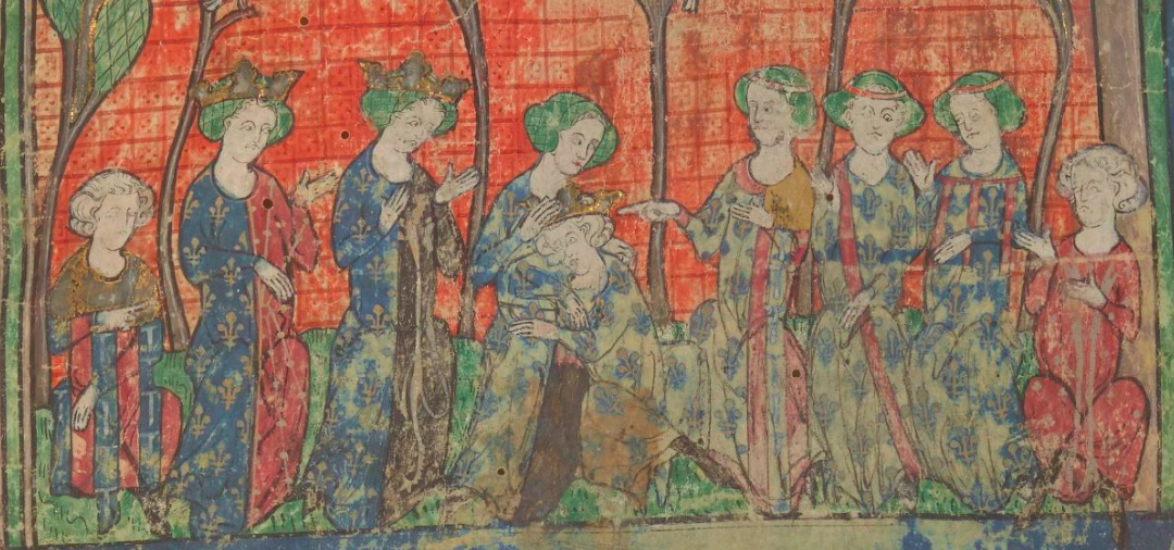 Philippe IV le Bel consolé par ses proches